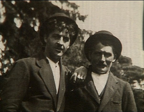 Carl Jularbo tillsammans med sin far Alfred Karlsson (1864 - 1952).